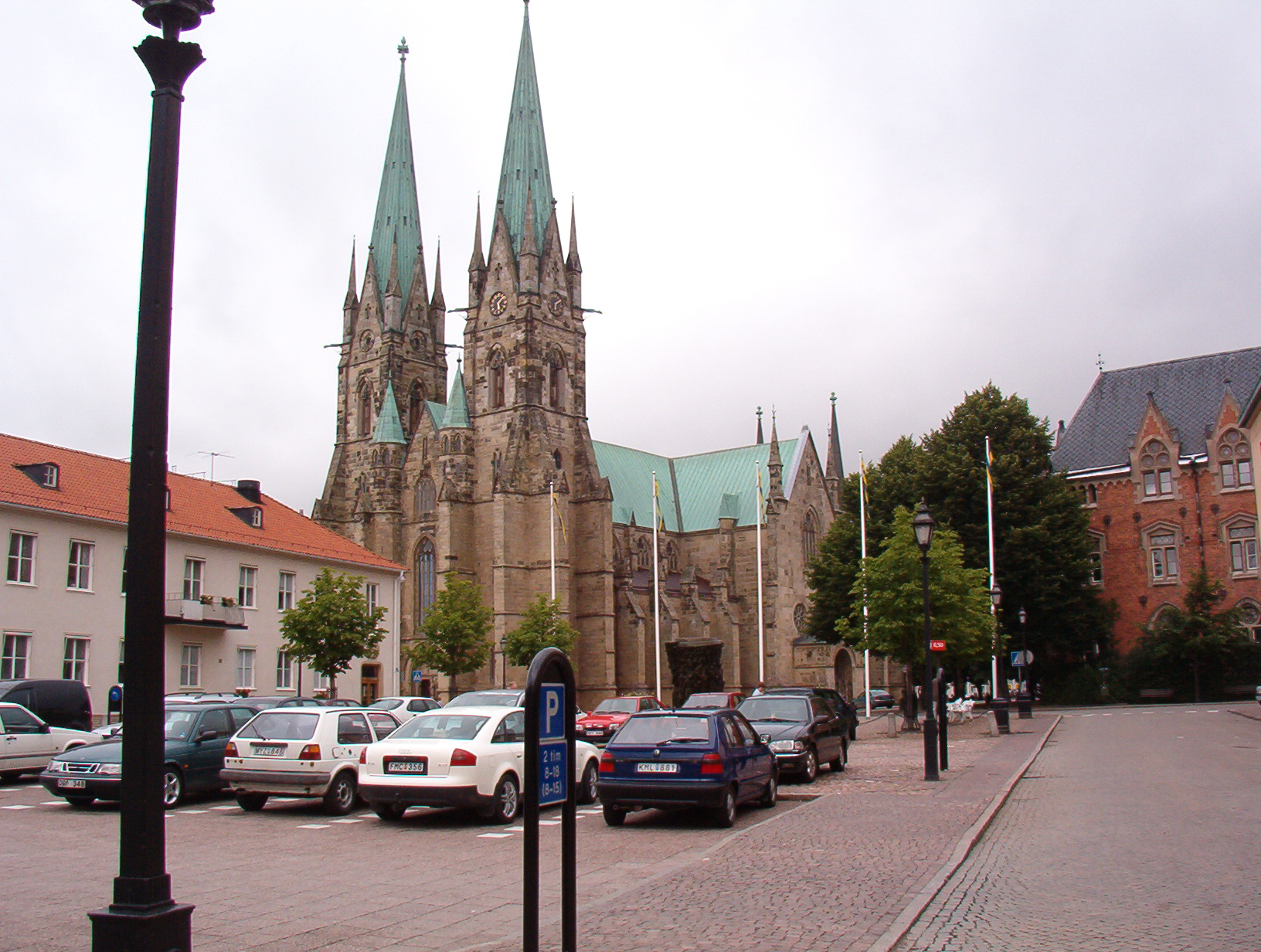 Skara domkyrka